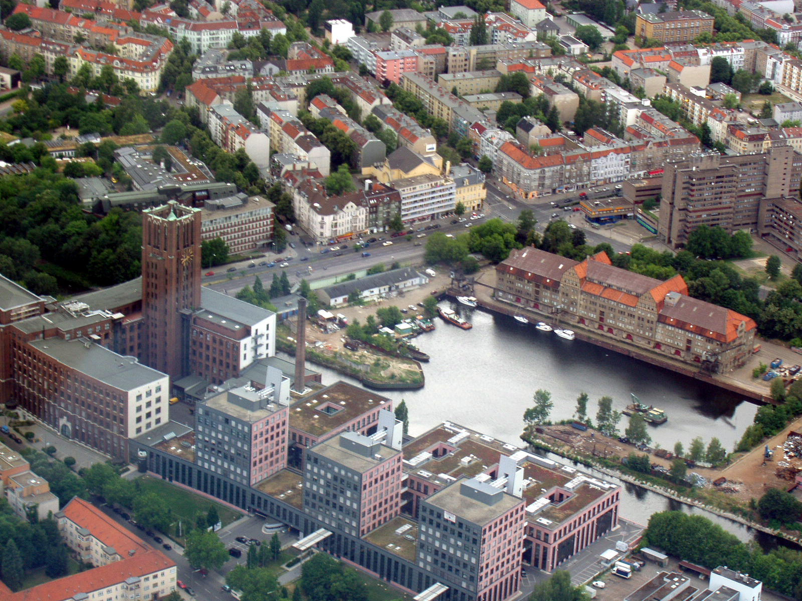 Ullstein-Haus und Hafen Tempelhof in Berlin